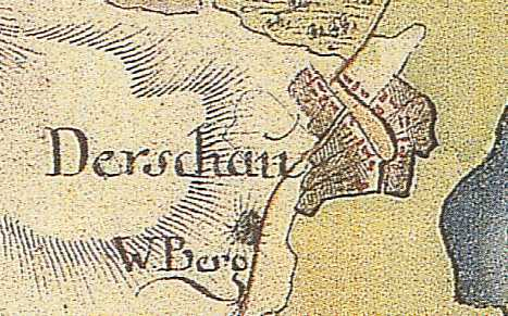 Karte von Horstfelde, damals noch Dergischow genannt (Ortsteil der Stadt Zossen, Brandenburg, Deutschland), aus den Jahren 1767 bis 1787, Land Brandenburg, Deutschland